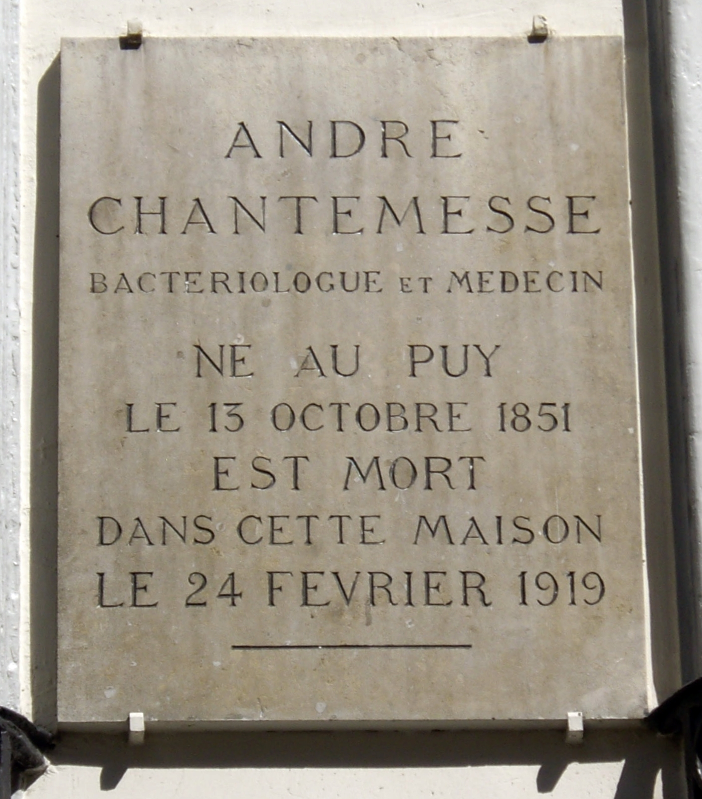 Plaque apposée au n° 30 de la rue Boissy-d'Anglas, Paris 8e.« André Chantemesse, bactériologue et médecin, né au Puy le 13 octobre 1851, est mort dans cette maison le 24 février 1919. »